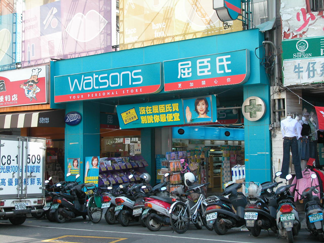 屈臣氏台南市區的一家分店